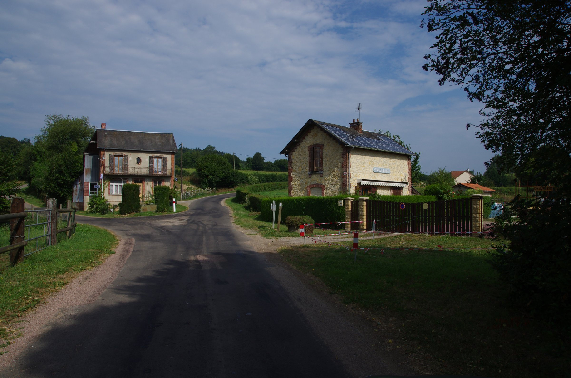 Gare neuville s touques